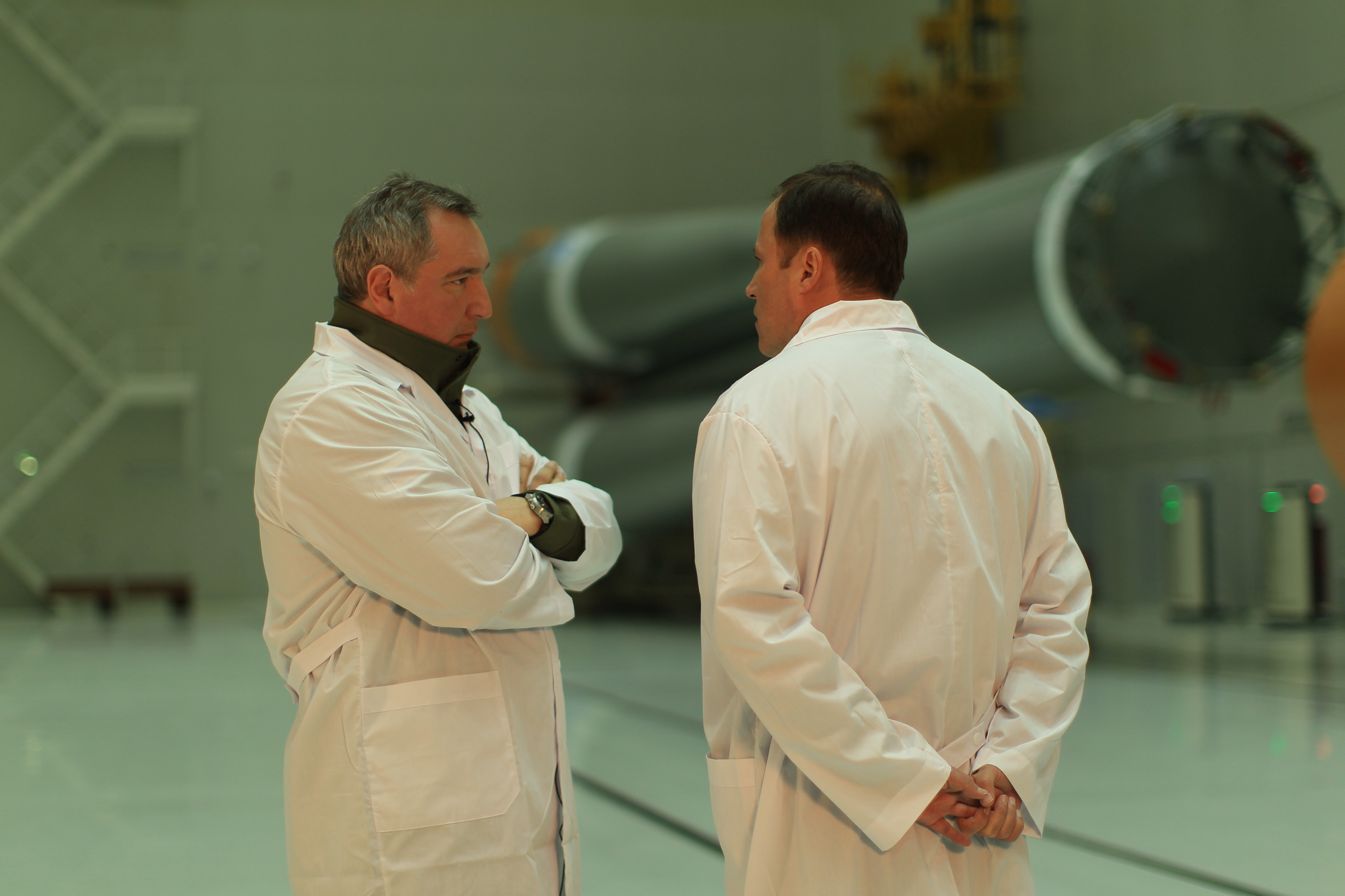 Вице-премьер и глава Госкорпорации обсуждают детали предстоящего сеанса связи с Москвой